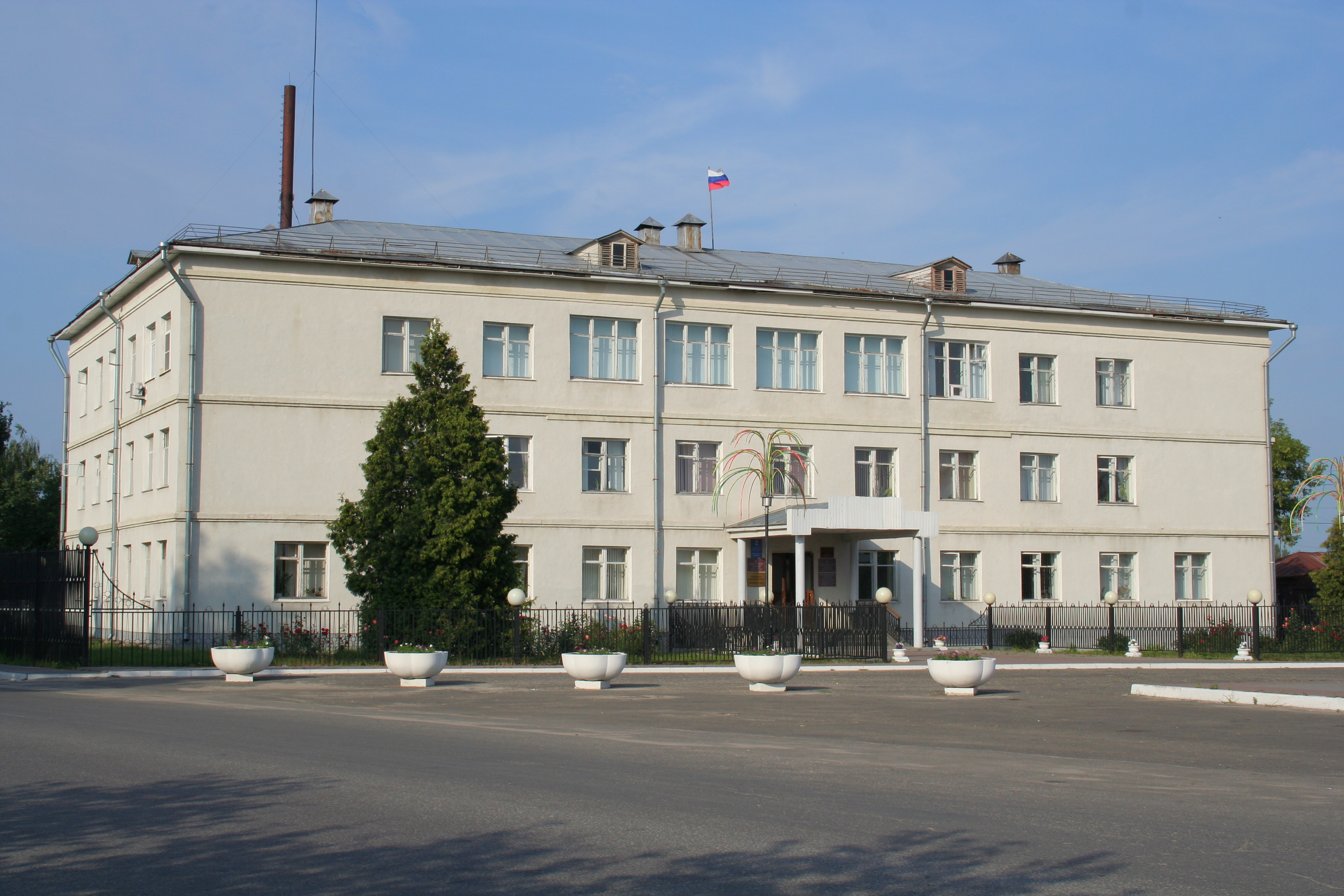 Stadt Spas-Klepiki (Oblast Rjasan, Russland). Das Gebäude der Stadtverwaltung.